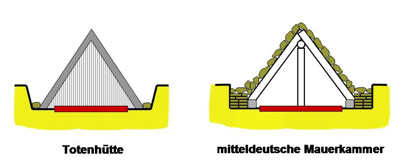 Totenhütte